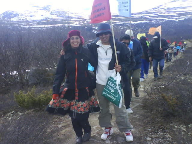 Asylsøkere, og representanter for Panter Tanter (Berit Rusten foran t.v.) gikk pilgrimsleden fra Trondheim til Oslo for å protestere på hjemsendelse til krigen i Afghanistan